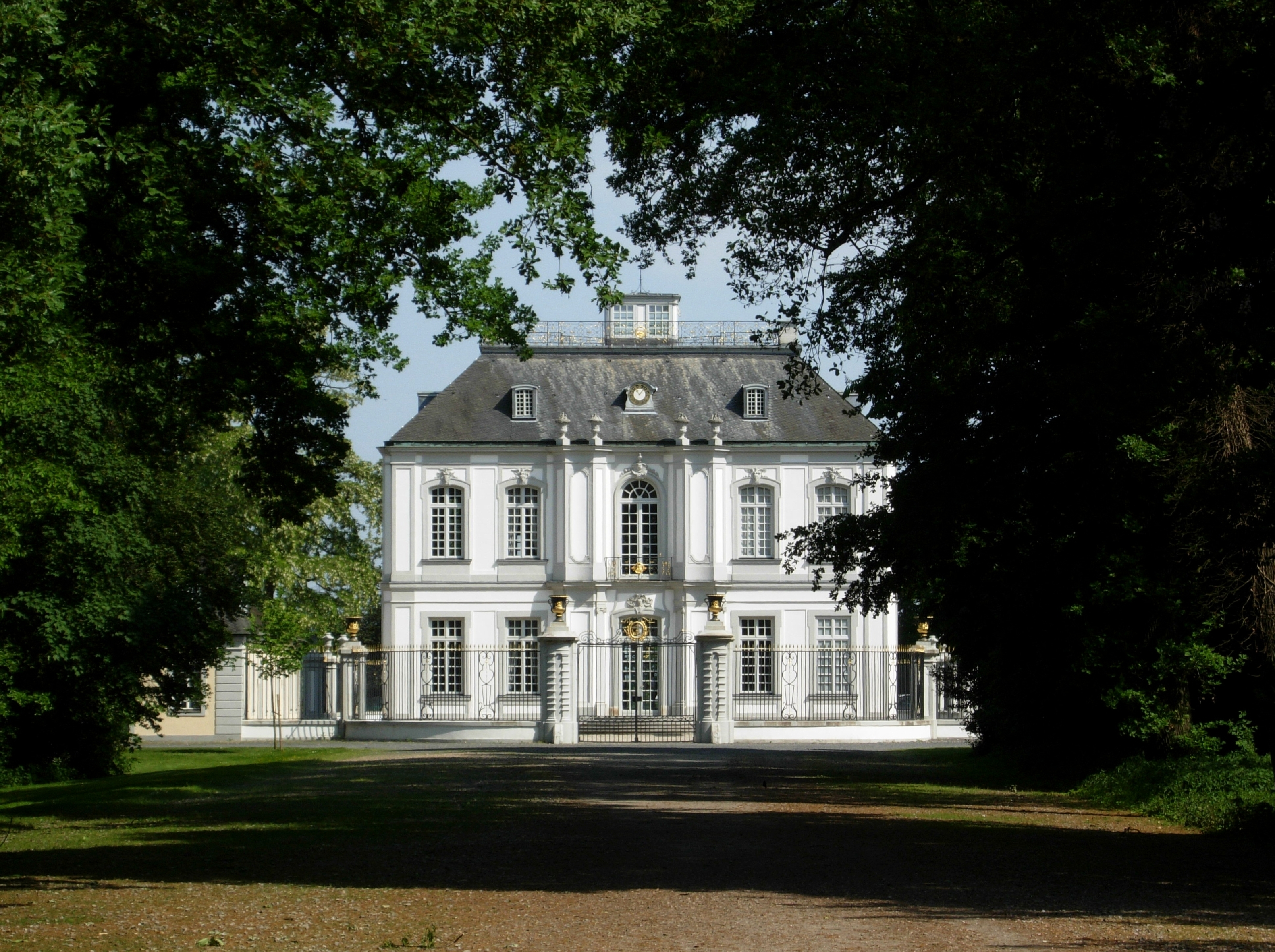 Westseite (Hof- und Parkseite) des Jagdschlosses Falkenlust in Brühl